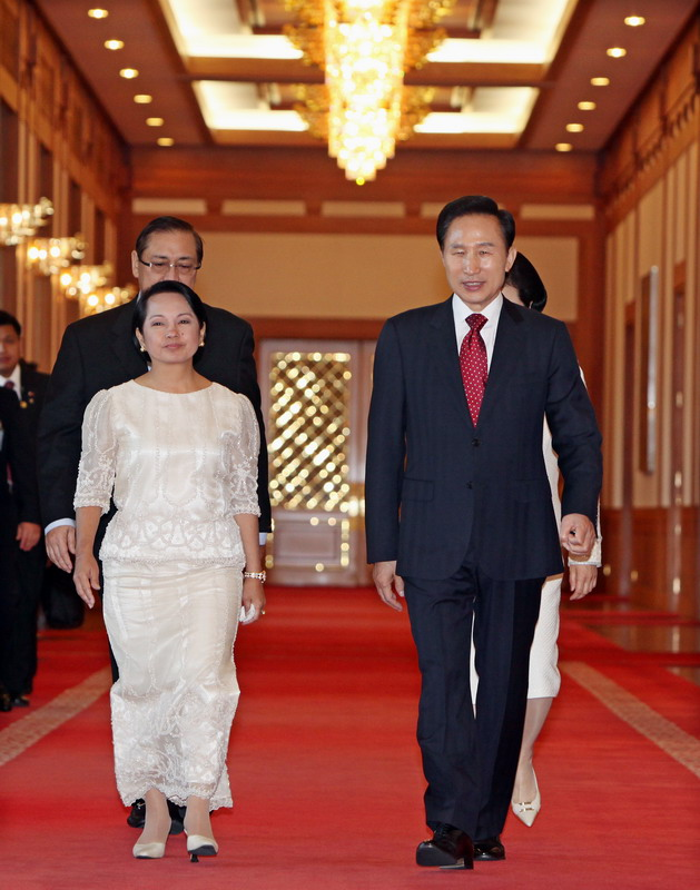 Philippine President Gloria Macapagal Arroyo visiting Korea in May 2009